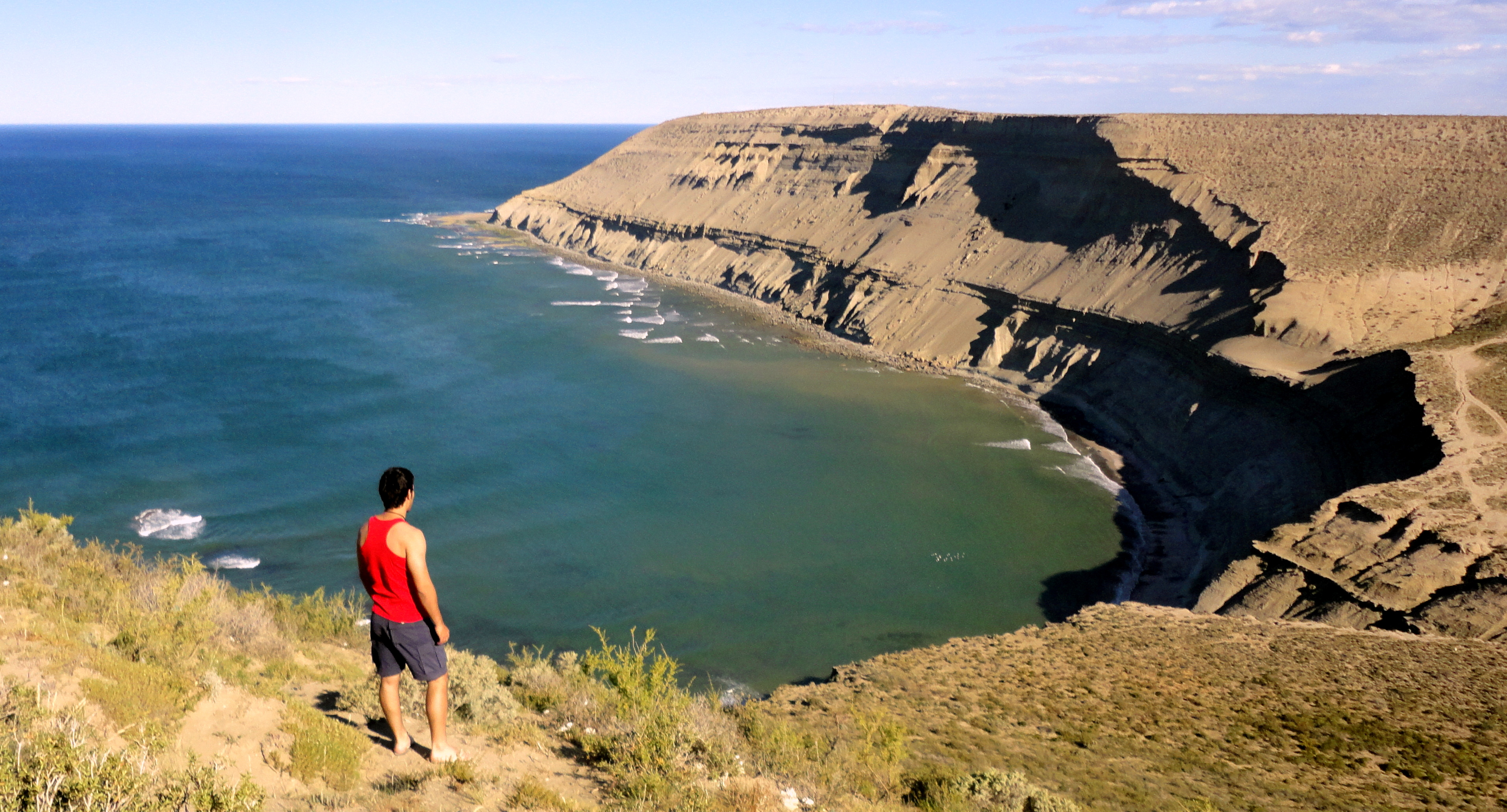 Arpón ballenero en el pequeño museo de la reserva natural punta del Marqués. Fue hallado en inmediaciones a La Lobería .